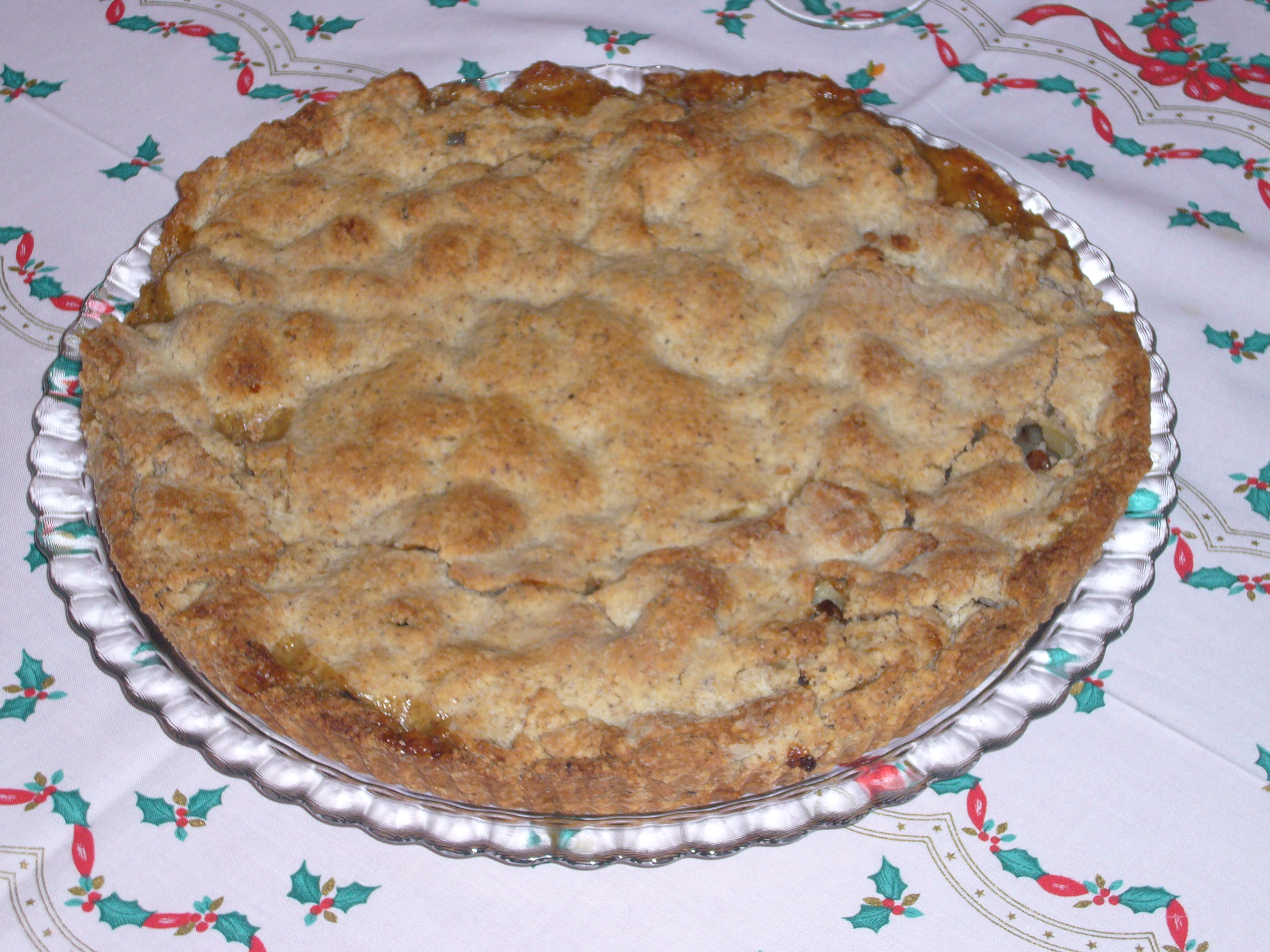 Téméraire (gâteau franc-comtois)